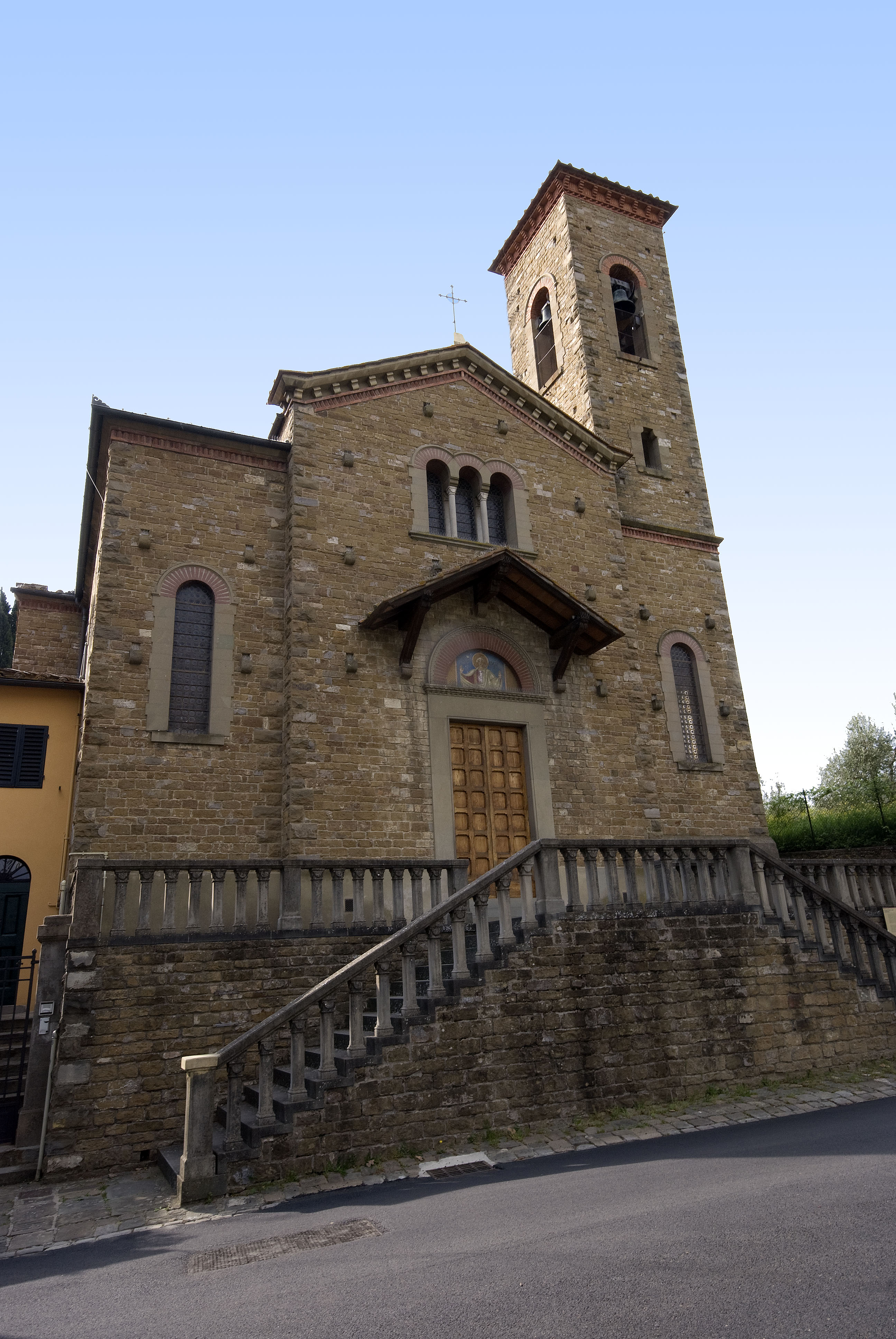 Chiesa di Santa Lucia al Galluzzo